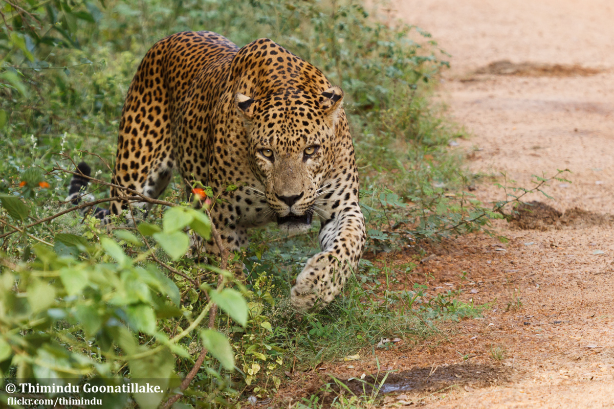 Sri Lankan Leopard - Yala National Park